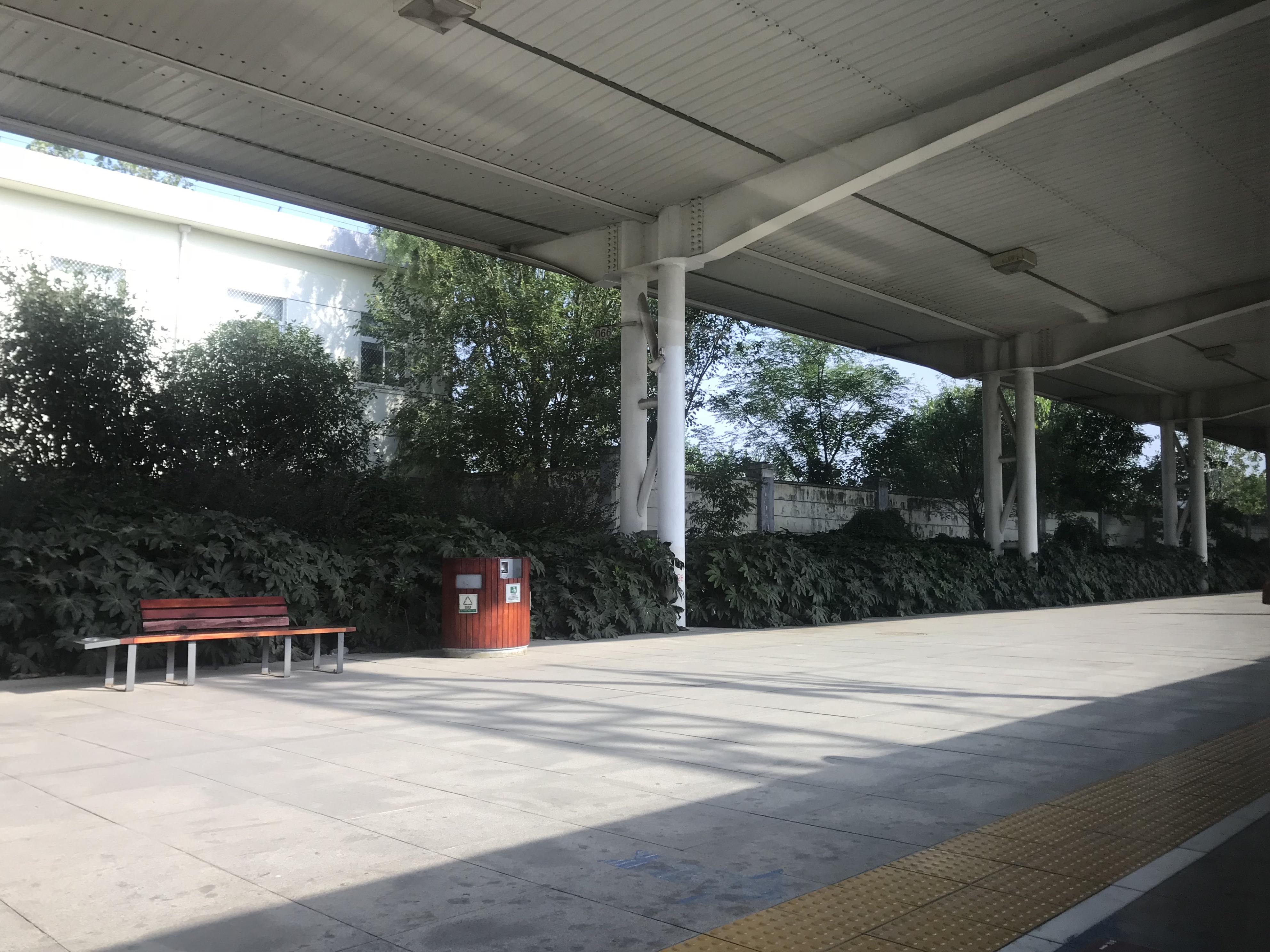 合武線の列車内より望む紅安西駅のホーム